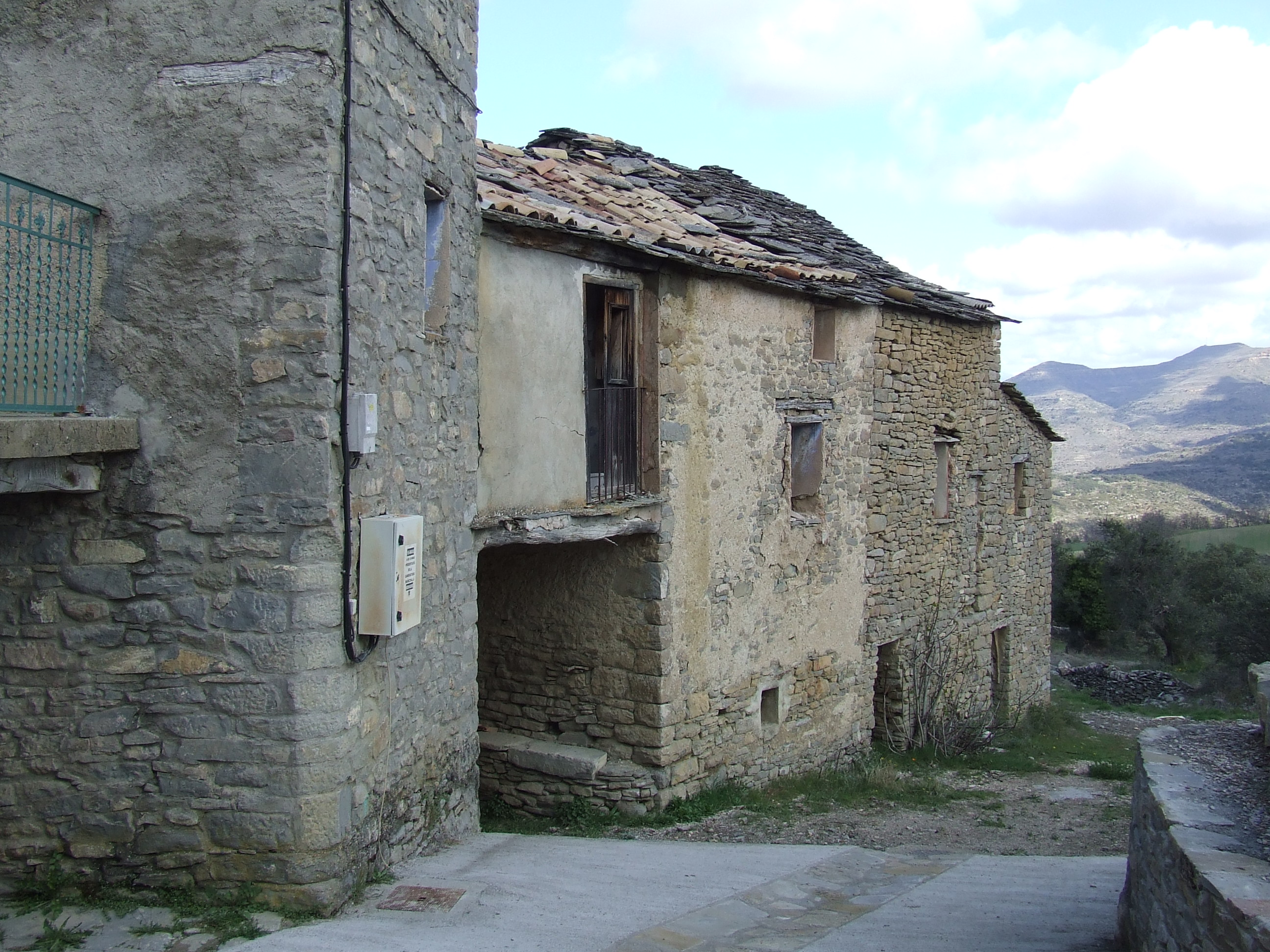 Cases que formen el clos del poble i portal d'entrada (la Torre d'Amargós, Sant Esteve de la Sarga, Pallars Jussà)